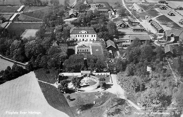 Häringe slott från luften 1936